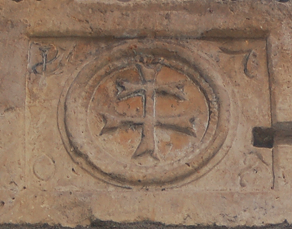 Wappen des Heilig-Geist-Spitals in Markgröningen